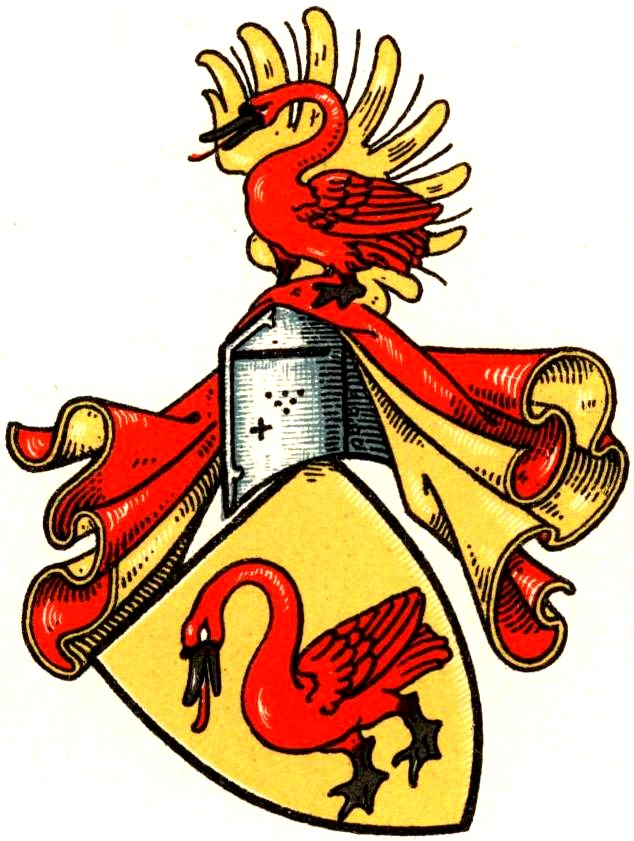 Stamm-Wappen der Grafen von Steinfurt